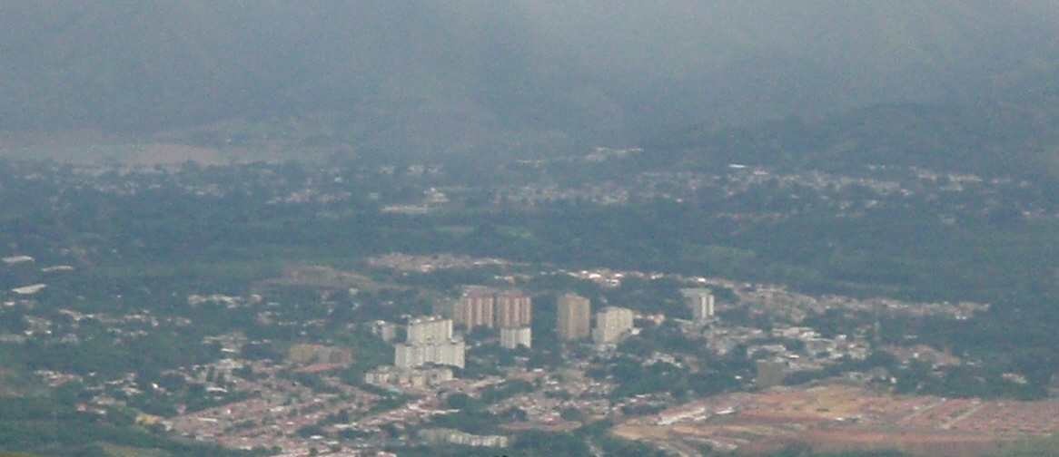 View of Cúa, Venezuela